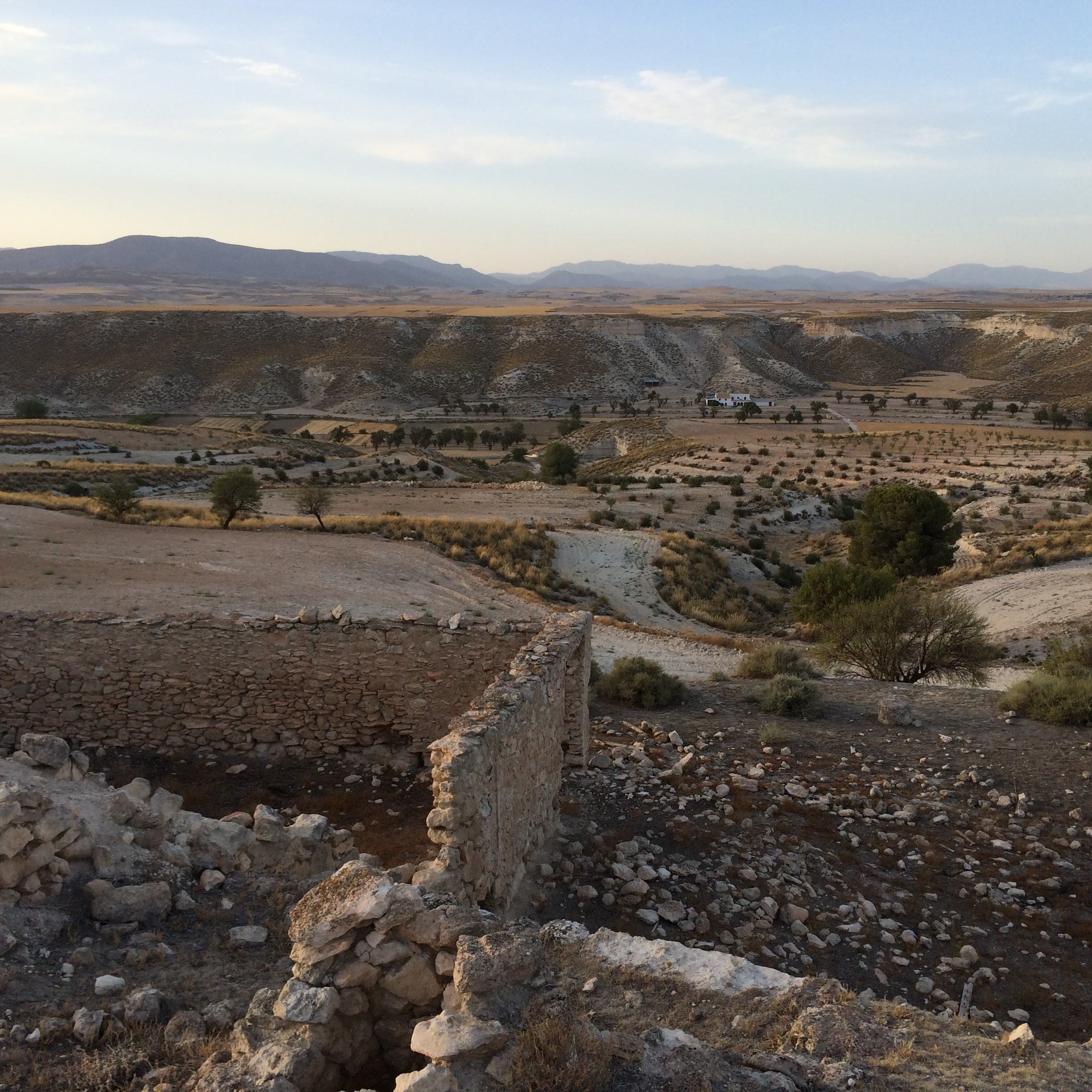 Yacimiento arqueológico, paleontológico y paleoantropológico de Barranco León en la región de Orce, provincia de Granada, España. En este yacimiento se encontró una muela de leche de un hominino de 1,4 millones de años